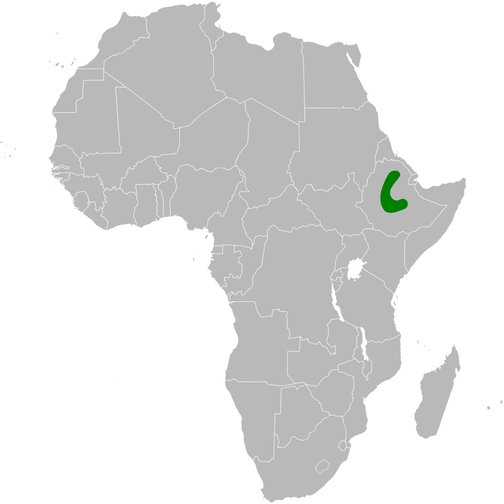 Calandrella erlangeri distribution map based on